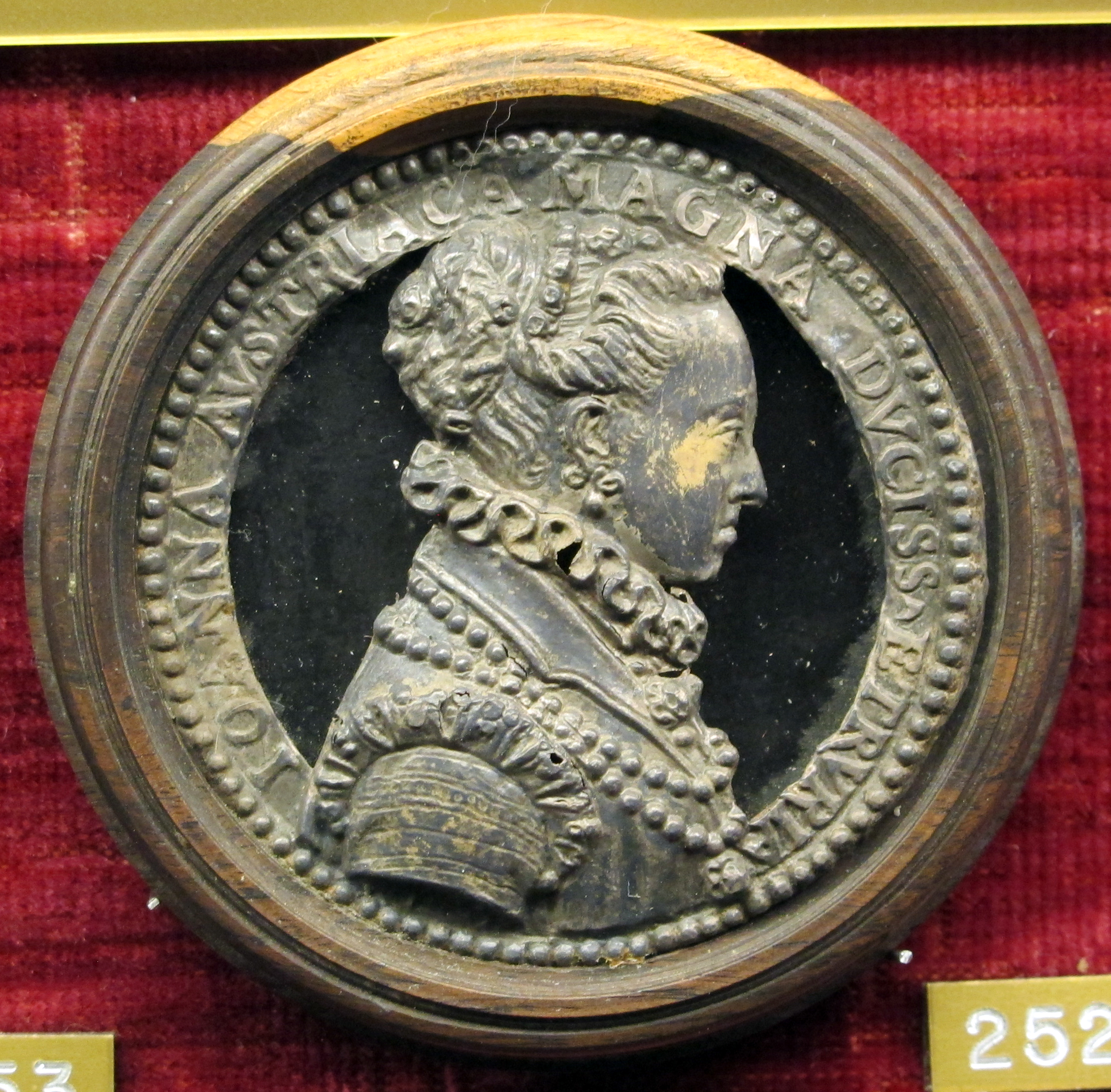 Medaglia di giovanna d'austria (e francesco de' medici, 1526